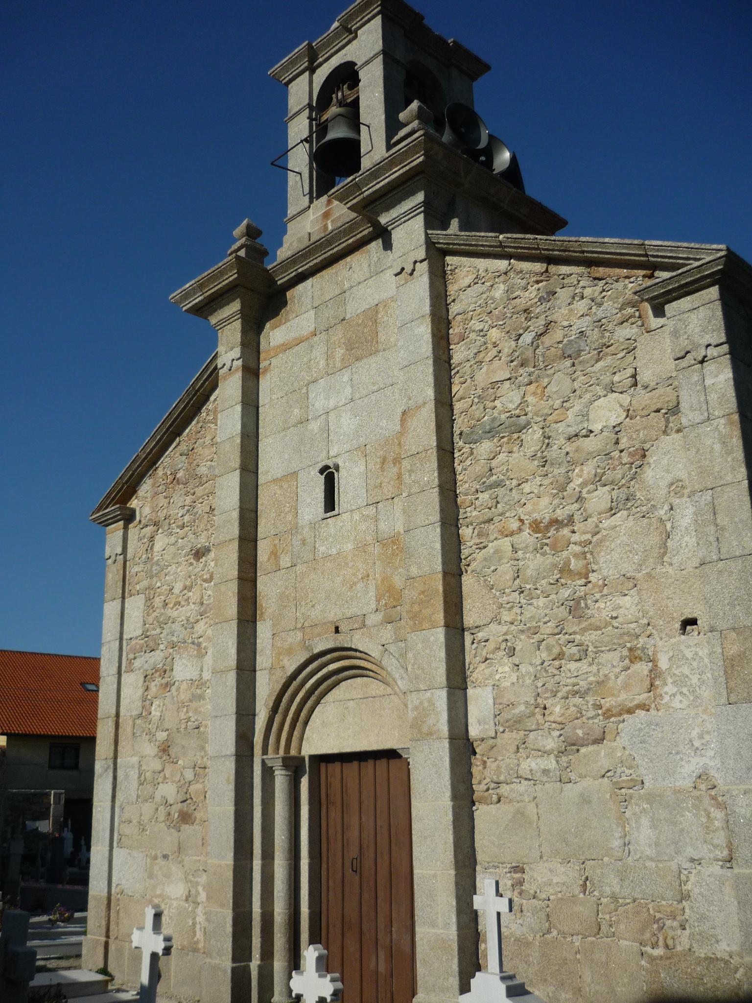 Igrexa románica de Santa Mariña do Obre, Noia, das máis antigas da zona (século XII). Restaurada en 2010.